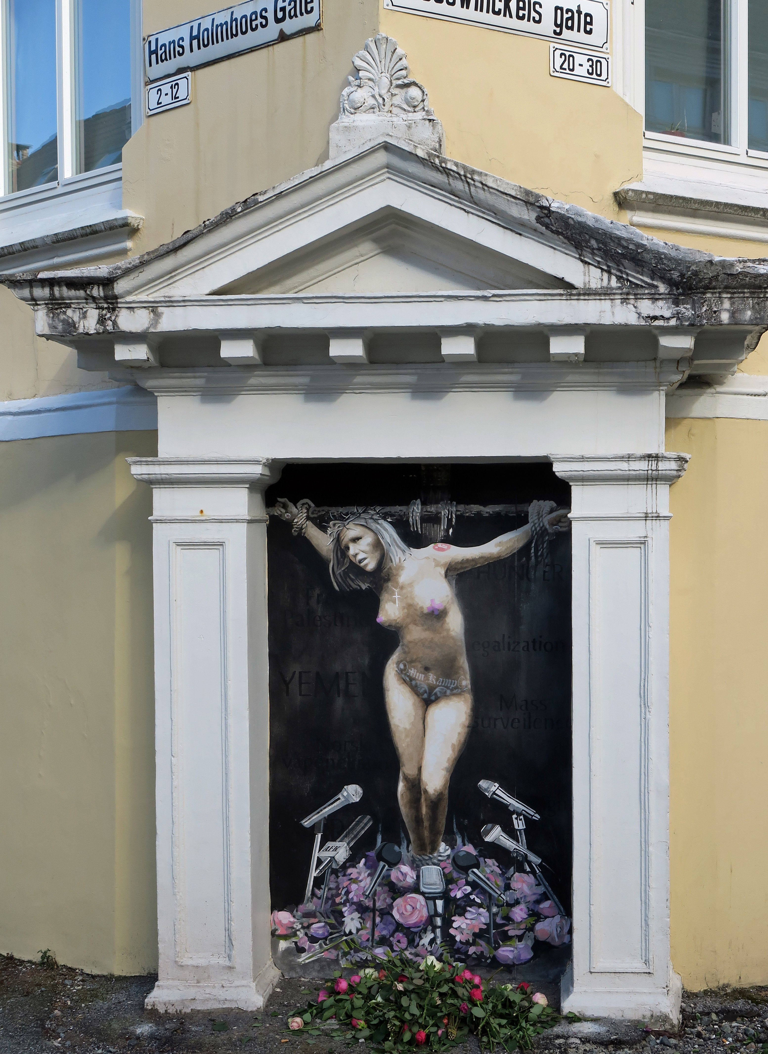 Gatekunst i Bergen 2018